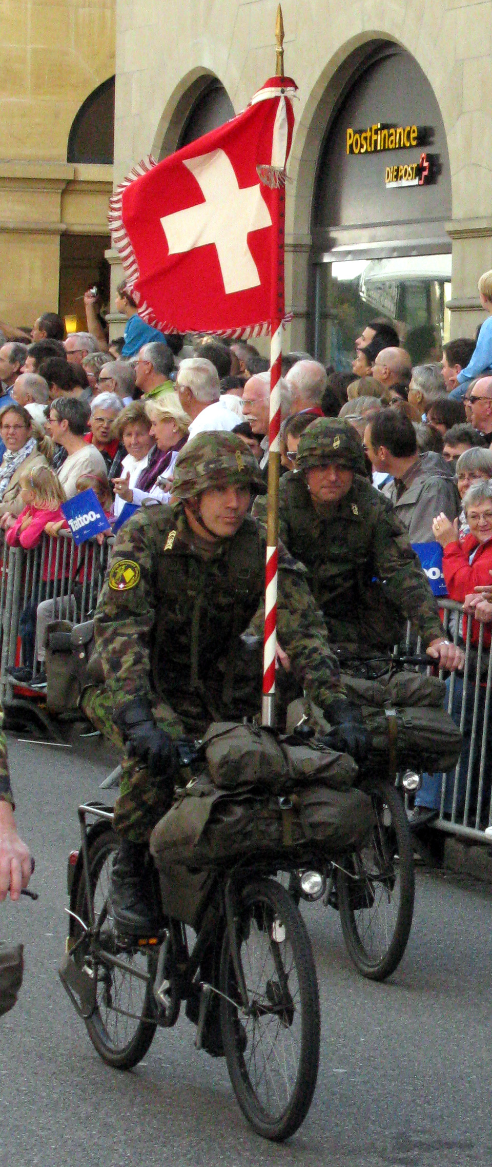 Basel Tattoo Parade in der Freien Straße